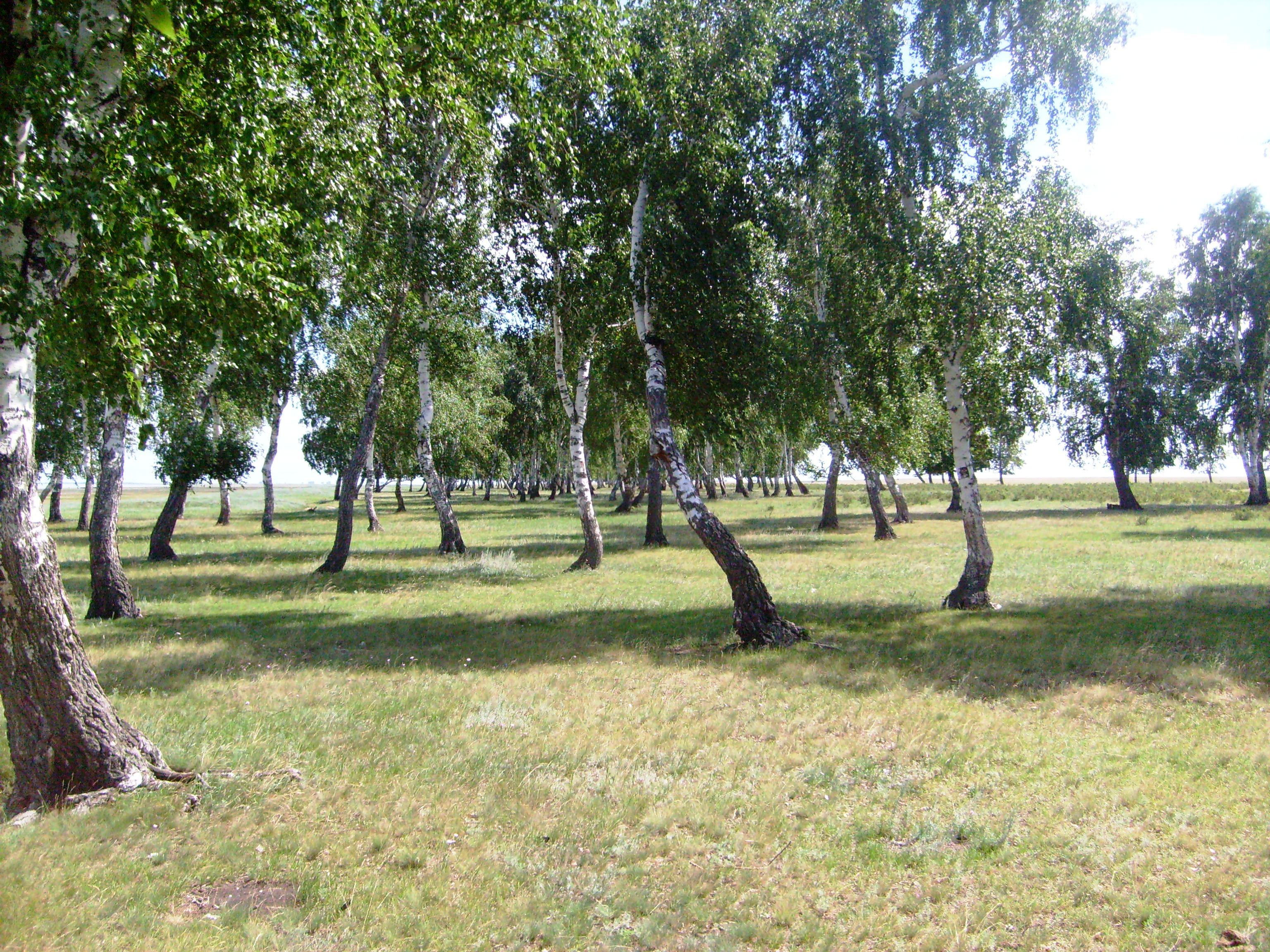 на берегу кулундинского озера